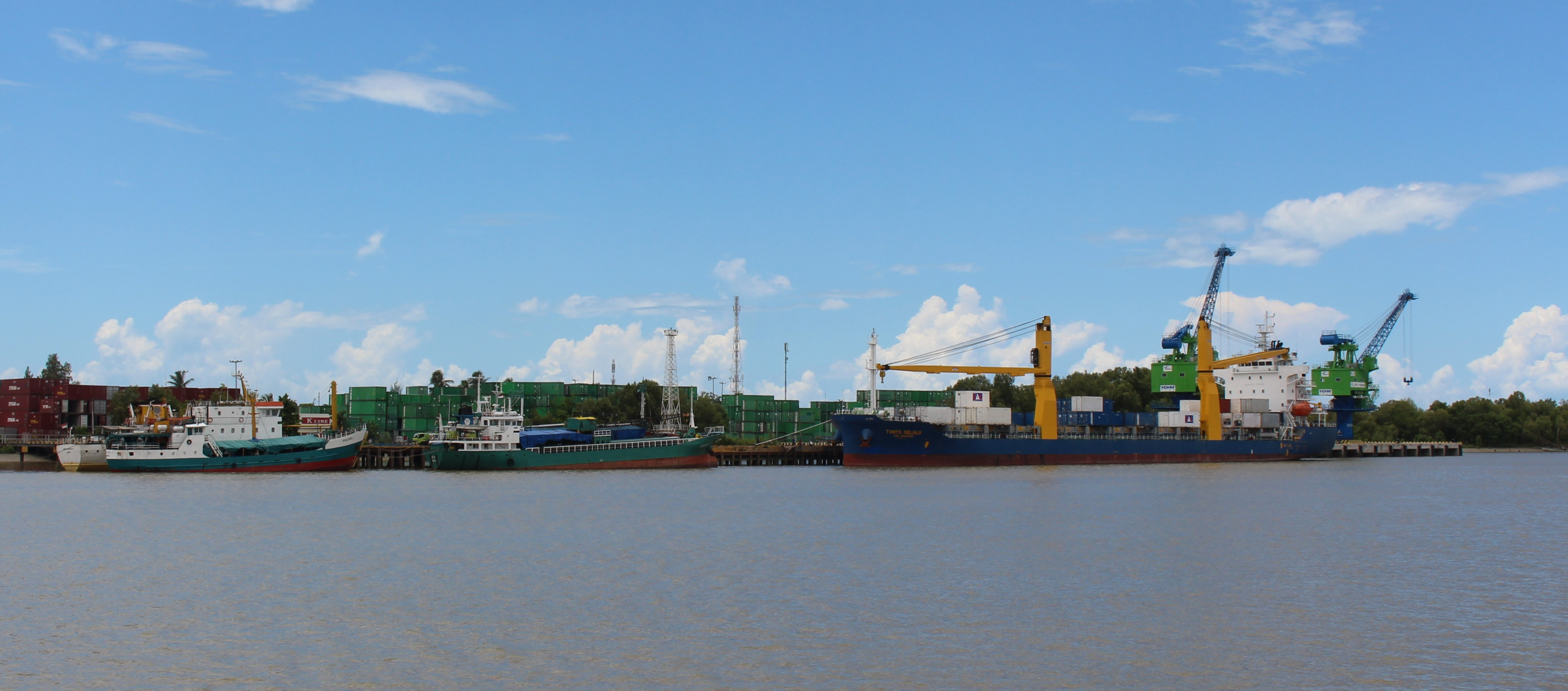 Kapal barang sedang bersandar di dermaga pelabuhan Merauke.